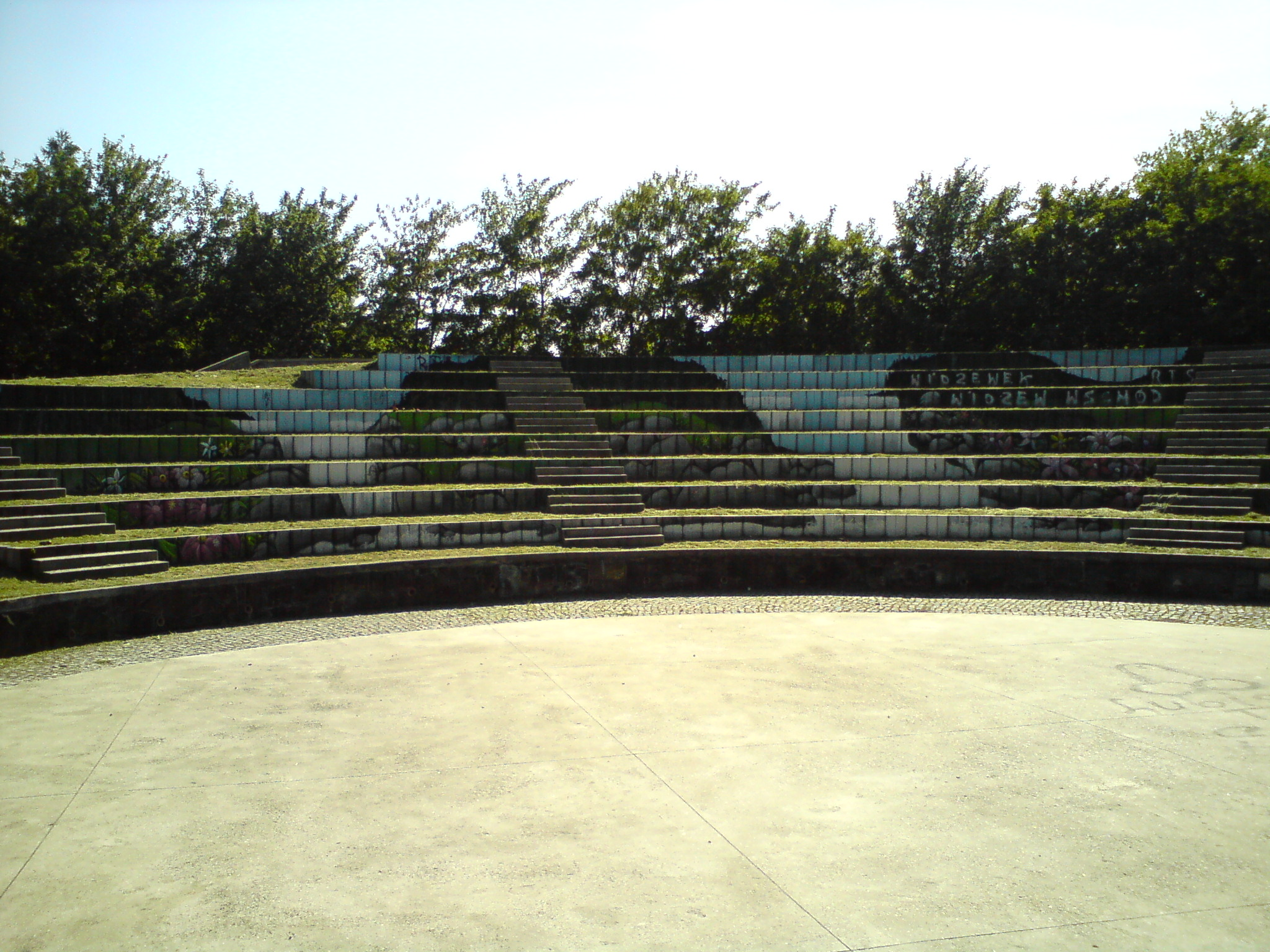 Amfiteatr w parku Baden-Powella w Łodzi (widok ze sceny)